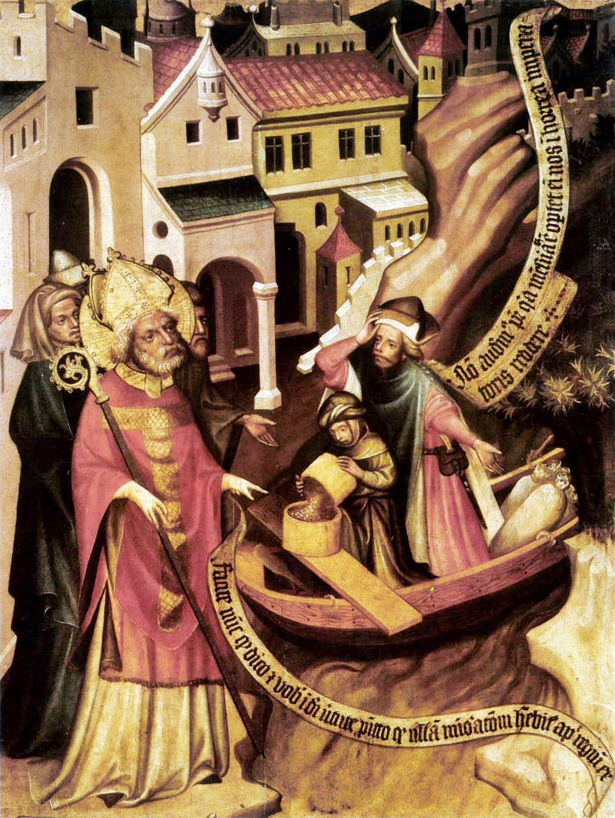 A garamszentbenedeki templom oltárképének egyik táblája